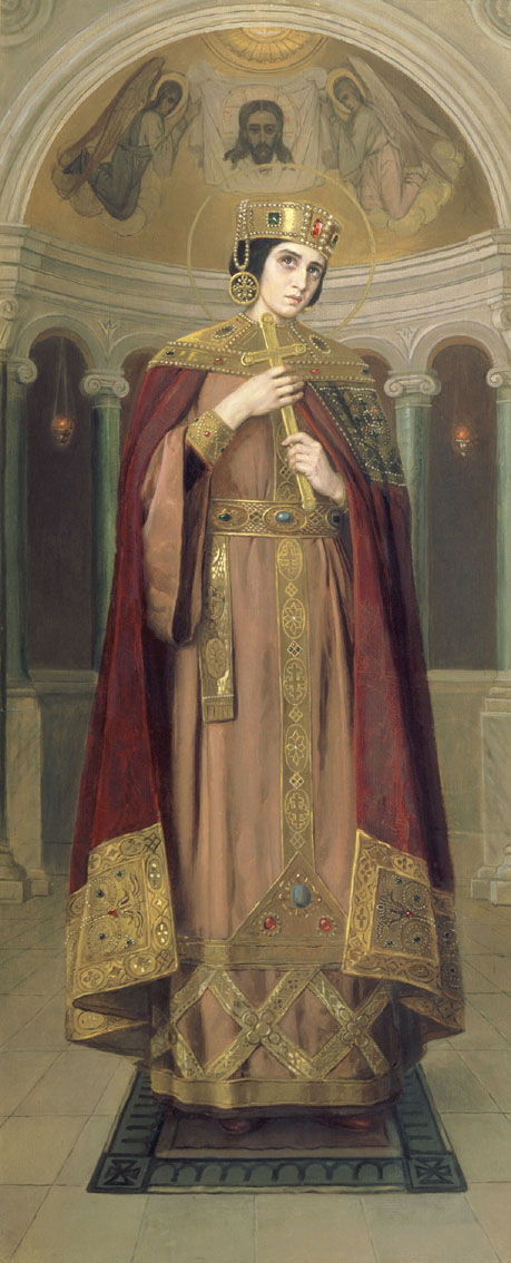 Saint queen Alexandra